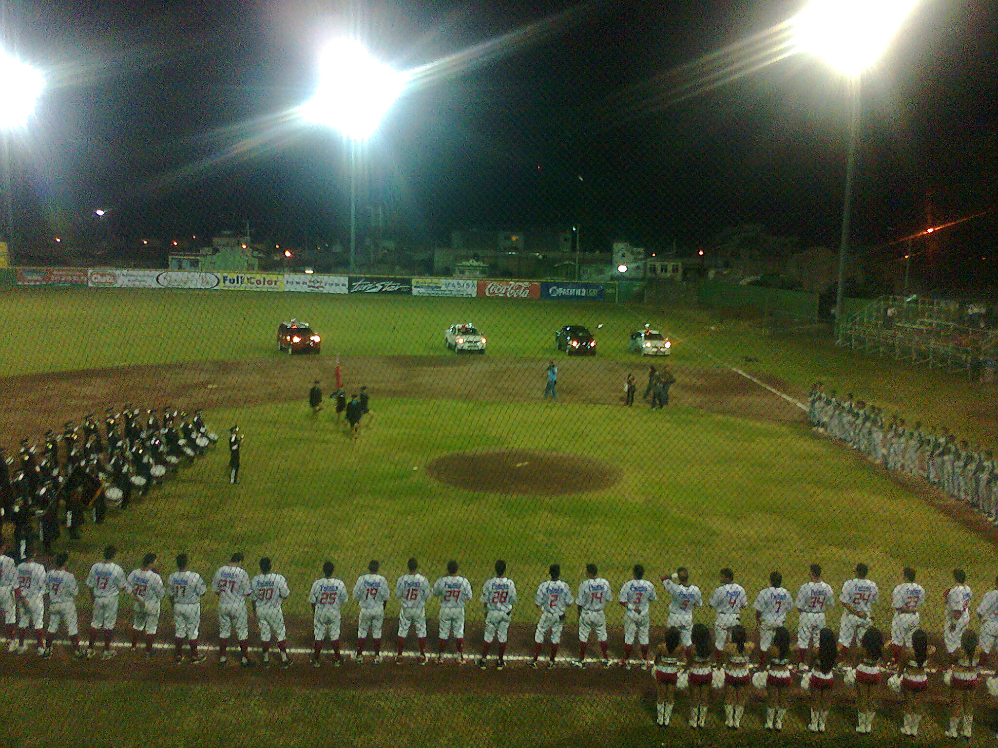 Inaguracion de la Temporada 2010-2011 de la Liga de Beisbol del Noroeste, en la Ciudad de Tepic, Nayarit. Jugando los locales Diablos Rojos contra los Tabaqueros de Santiago.